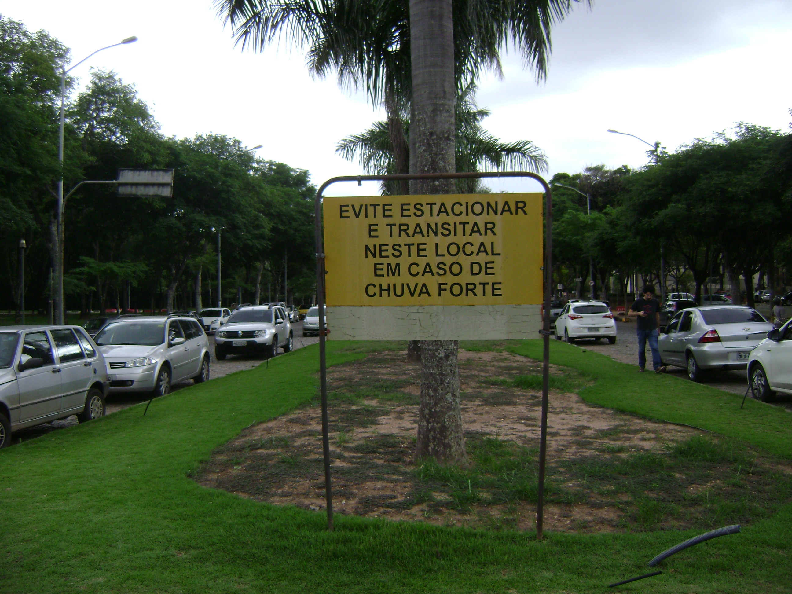 Placa alertando sobre estacionar ou transitar em caso de chuva forte na avenida Reitor Mendes Pimentel, por conta do risco de alagamentos, no campus Pampulha da UFMG, em Belo Horizonte.